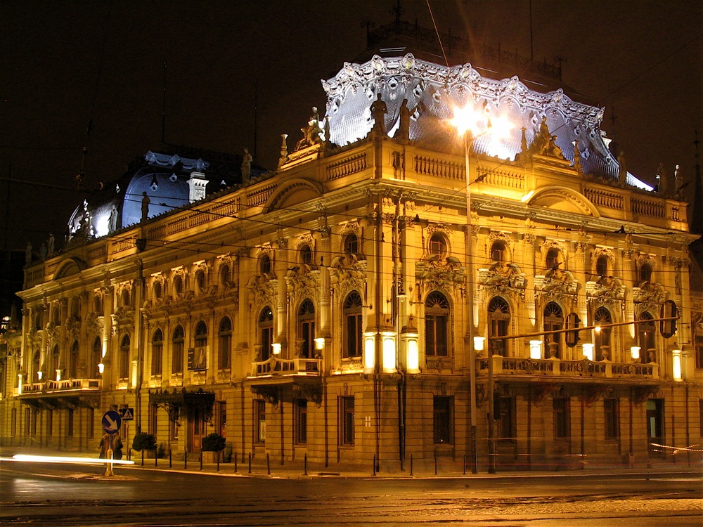 Pałac Izraela Kalmanowicza Poznańskiego w Łodzi, dziś Muzeum Historii Miasta Łodzi